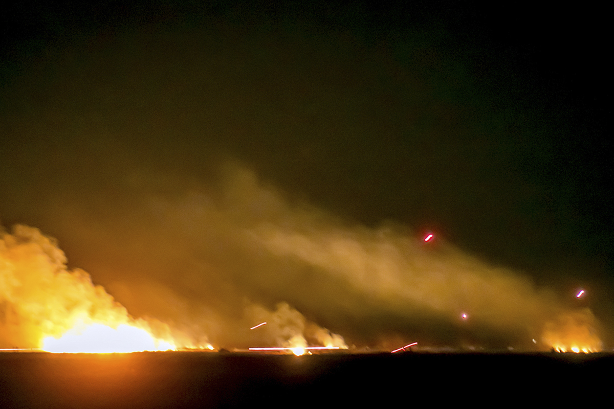 Полевой выход военнослужащих мотострелкового батальона Оперативной группы российских войск в Приднестровской молдавской республике.